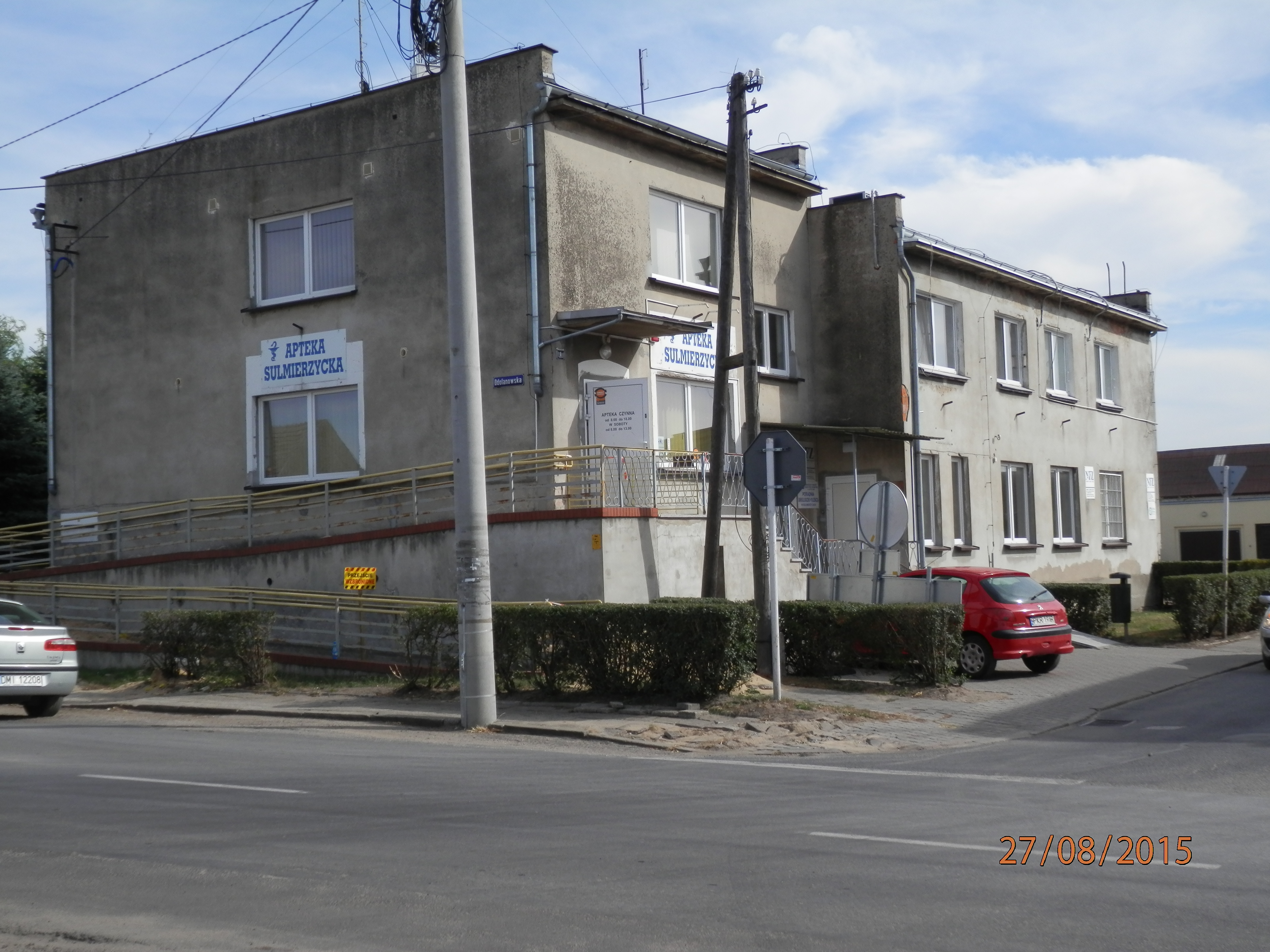 Budynek placówki SG Sulmierzyce. Budynek jest po przebudowie.